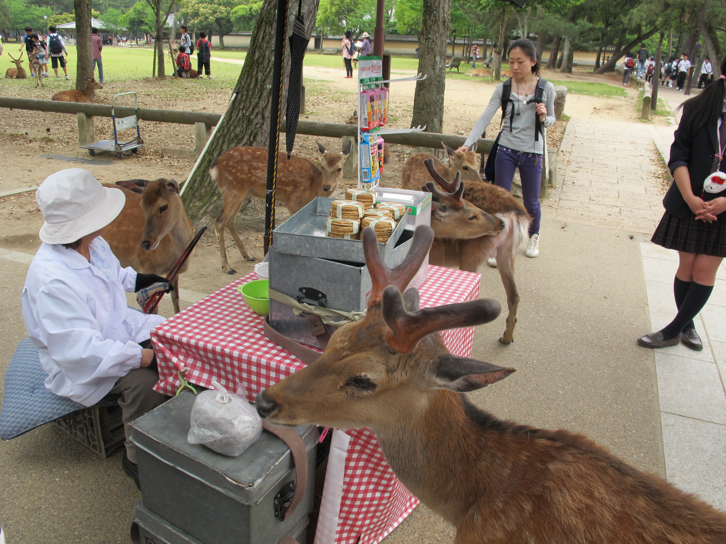 Nara, deers